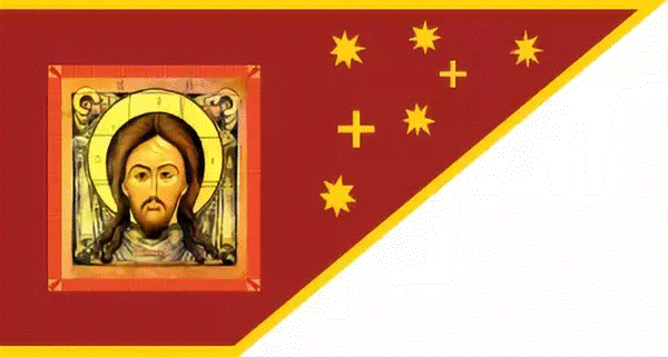 Флаг России при Иоанне Грозном